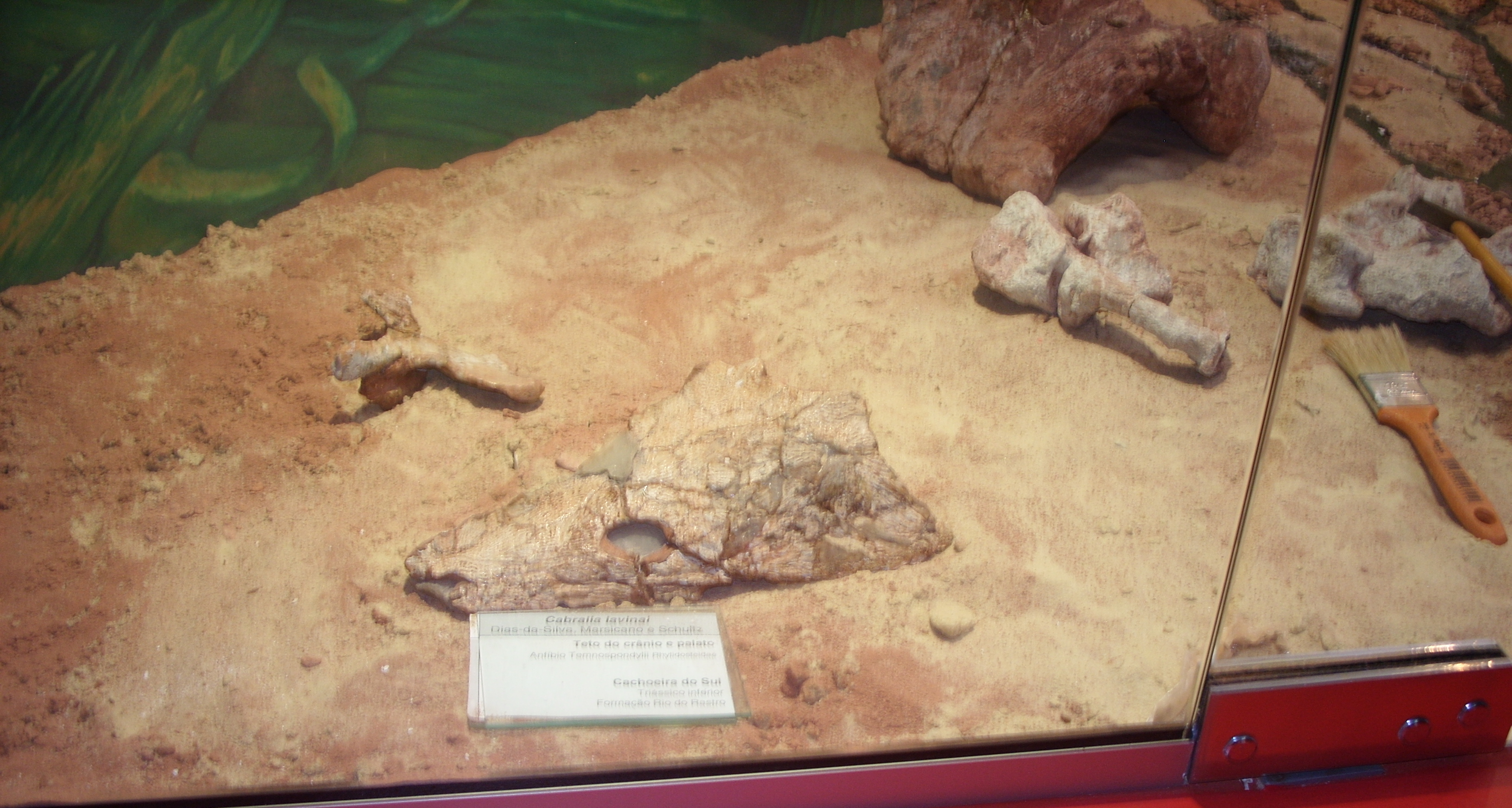 Sangaia lavinai no museu da UNISINOS - Ânfibio Temnospondyli encontrato na PALEORROTA